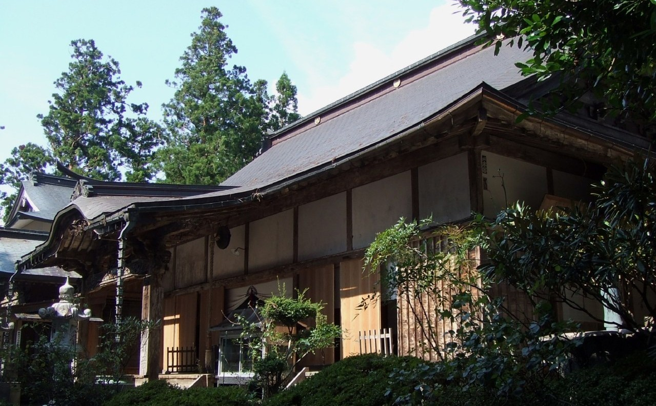 鶴林寺の大師堂